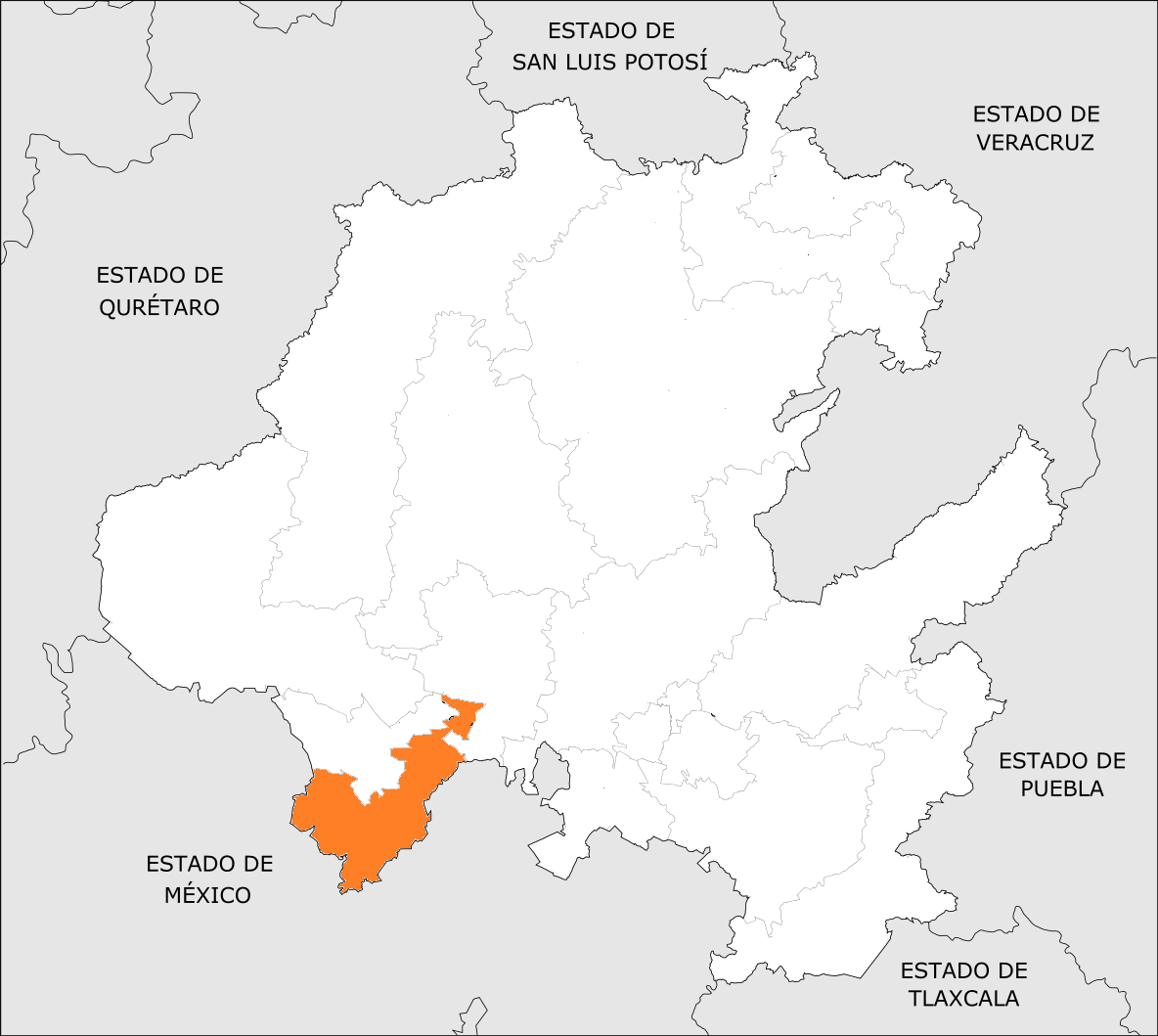 Distrito Electoral Local de Hidalgo 15